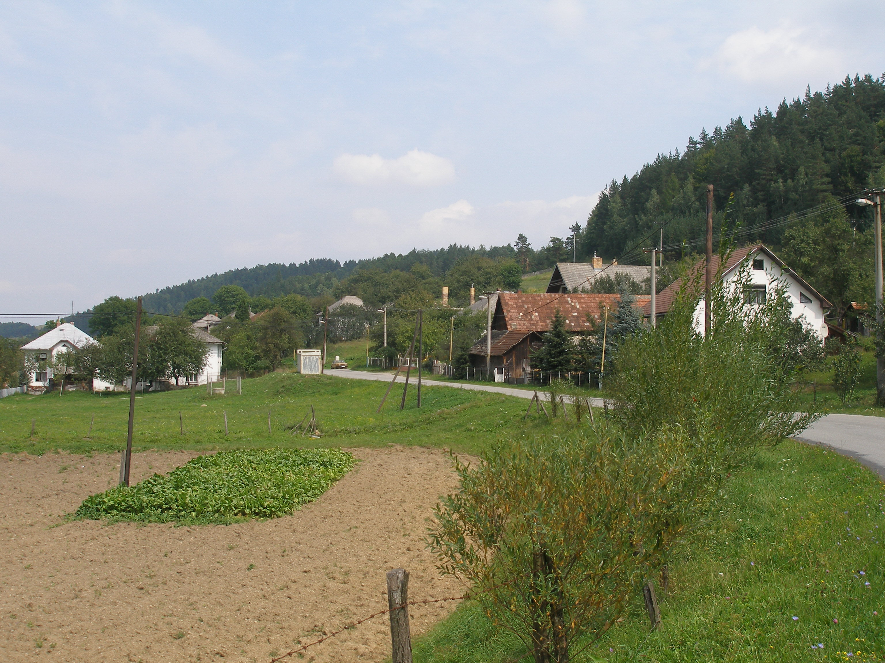 Šarišská obec Krížovany